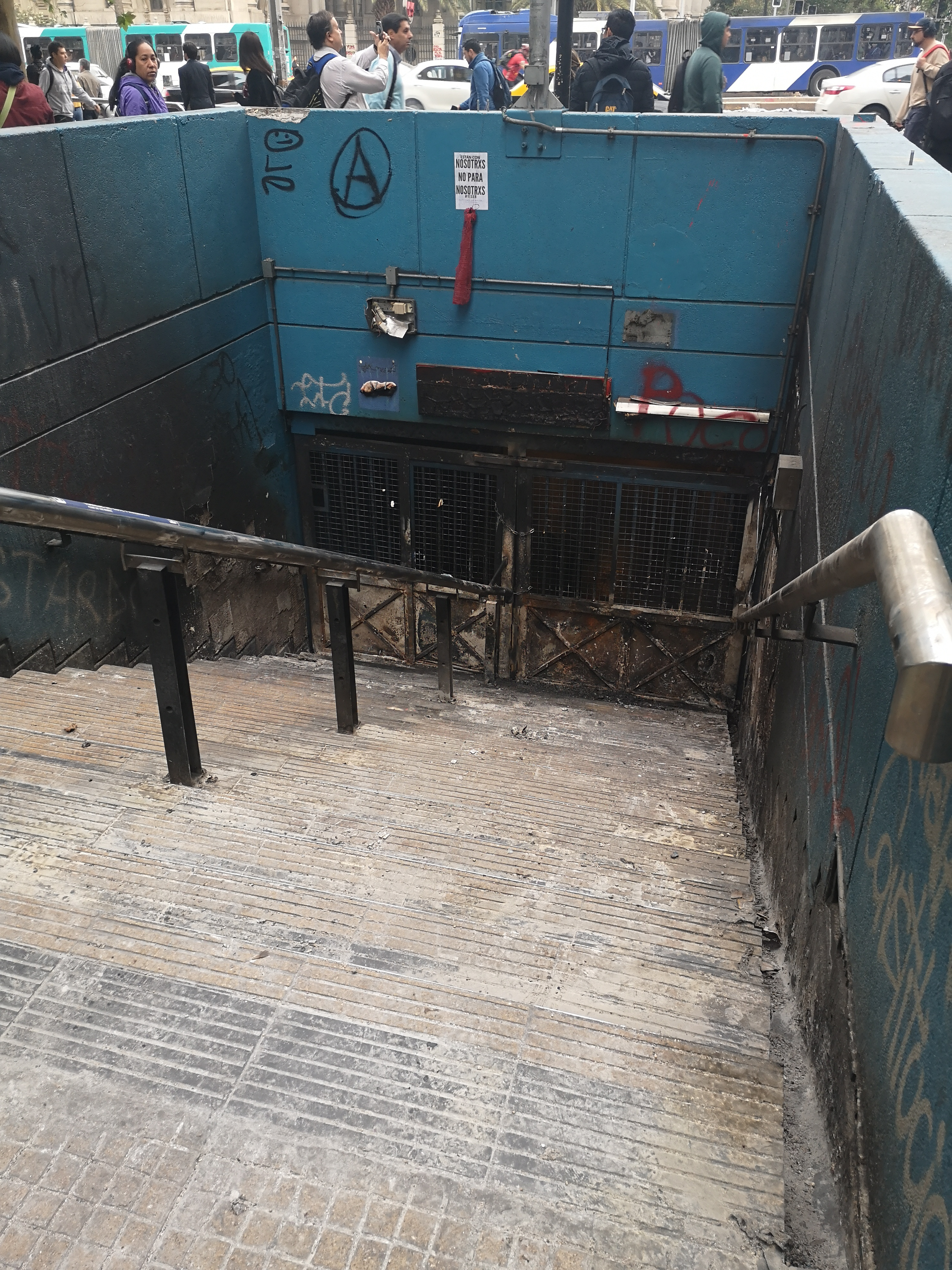 Acceso cerrado Estación Santa Lucia del Metro de Santiago el 29 octubre 2019, luego que se incendiara el acceso de la estación el 28 de octubre durante las manifestaciones.